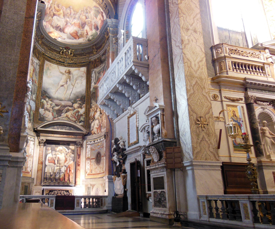 Roma, chiesa di Santa Maria dell'Anima, interno, terza ed ultima cappella sinistra, detta Cappella del margravio